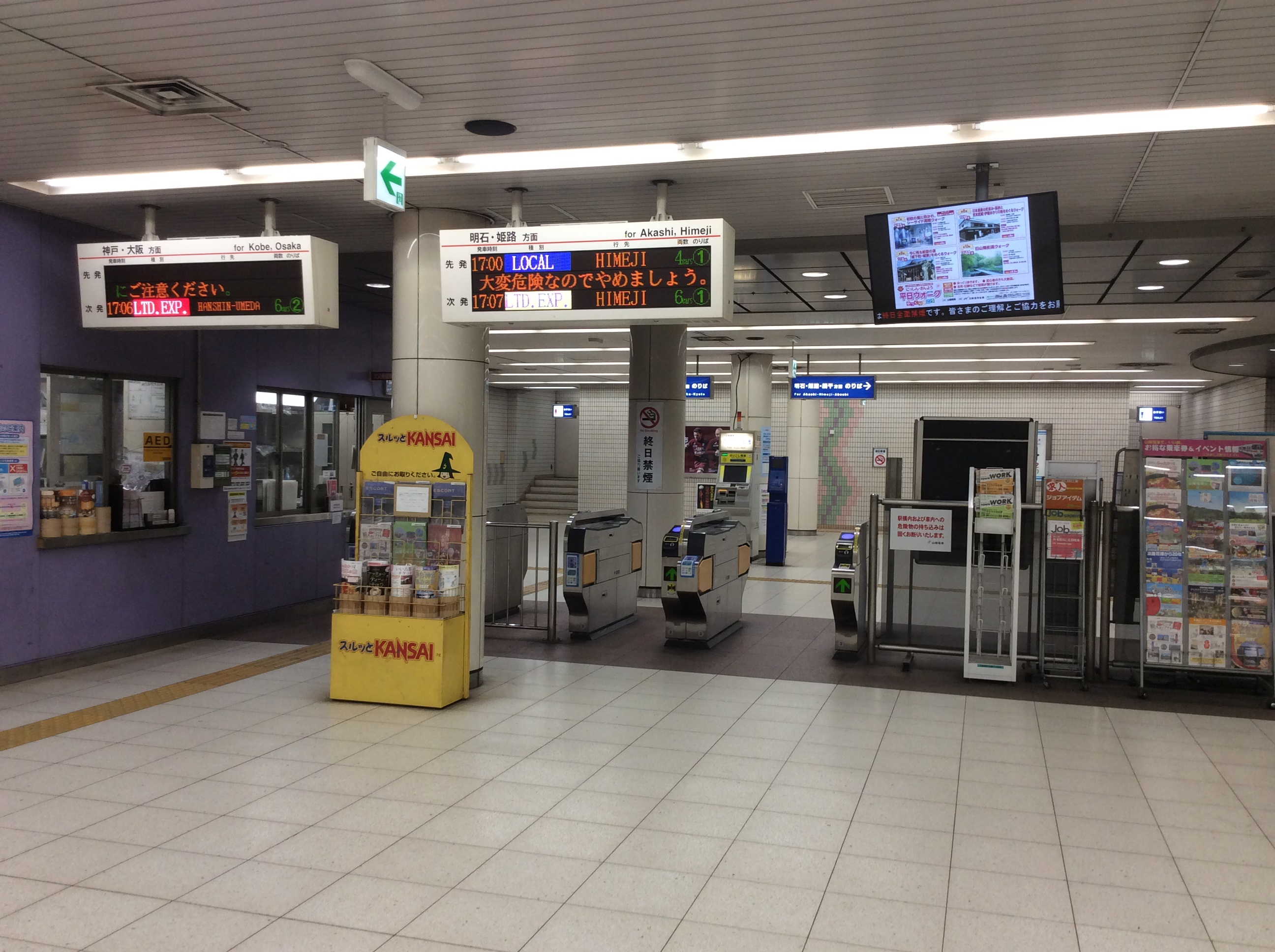 西代駅改札口